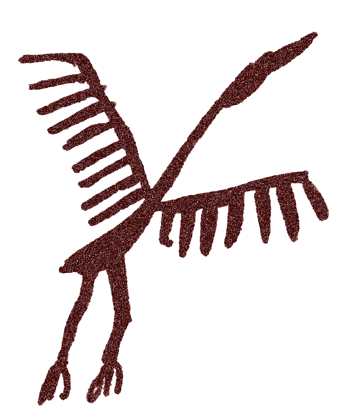 Arte esquemático ibérico: Cigüeña de Cantos de la Visera